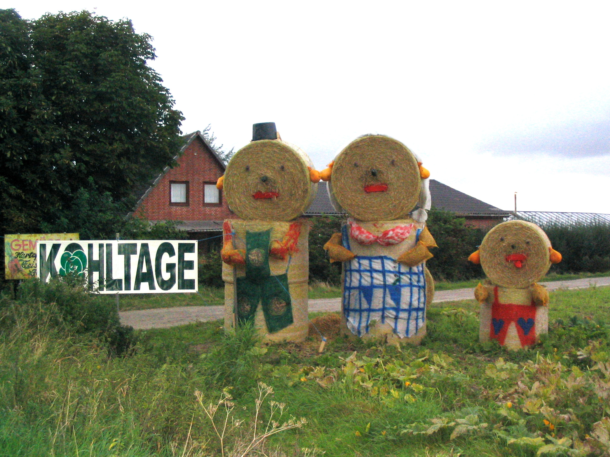 Kohltage (Cabbage Days) in Dithmarschen